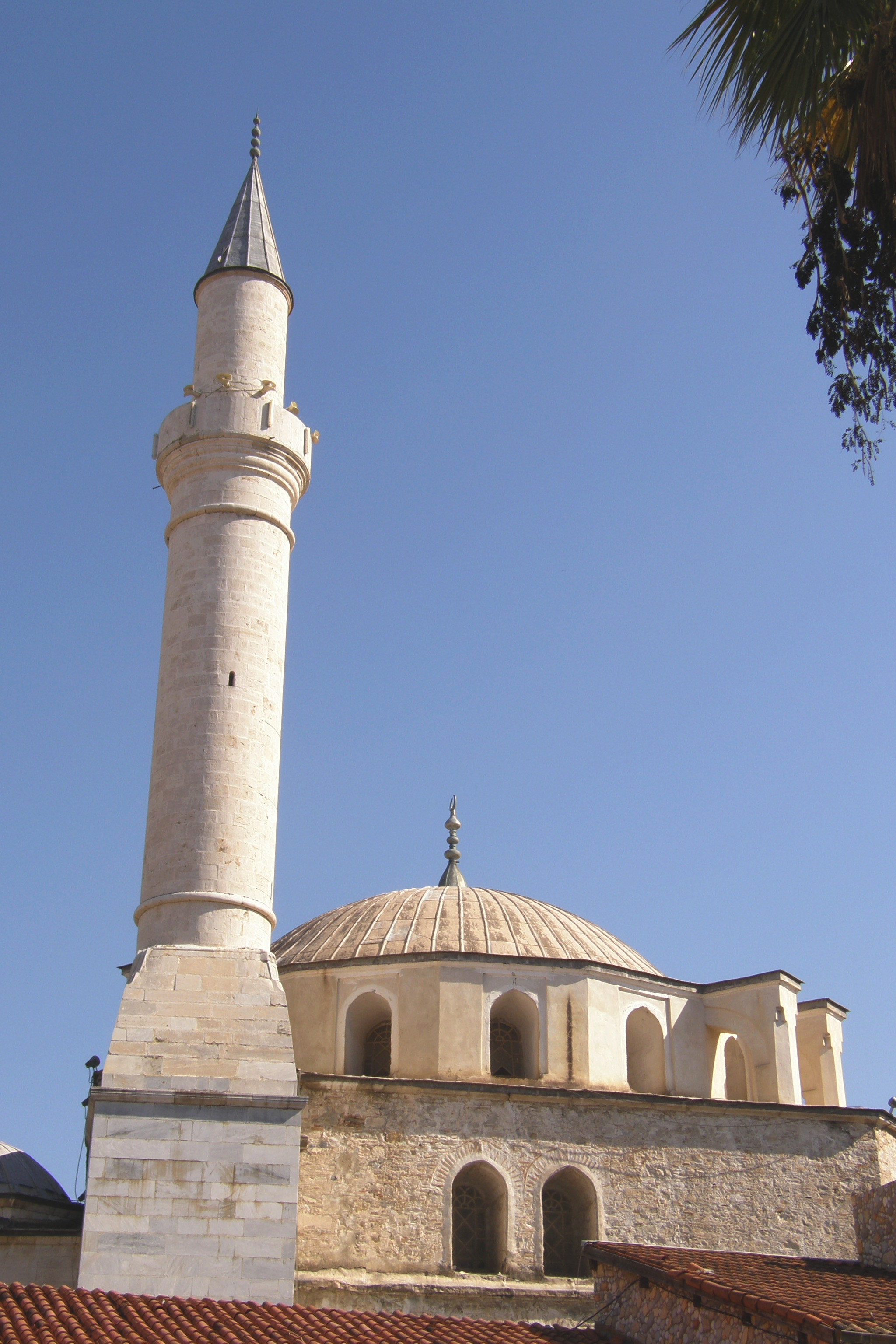 Mosquée Kaleiçi, Kuşadası, province d'Aydin, région Égée, Turquie. Kaleiçi camii construite au XVII ème siècle à la demande du Grand Vizir Öküz Mehmet Pasha. Photo prise du boulevard Barbaros.